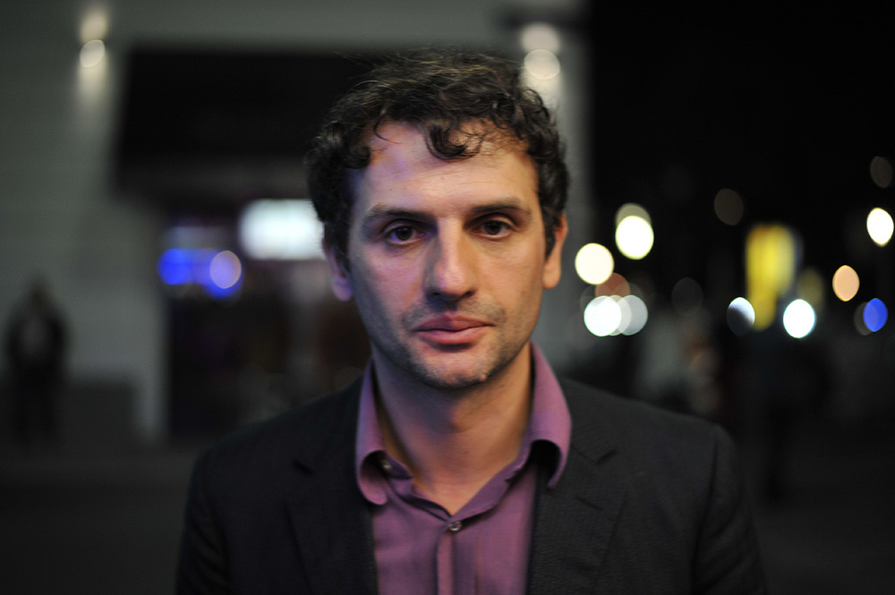 Serge Bozon bei der Viennale 2013